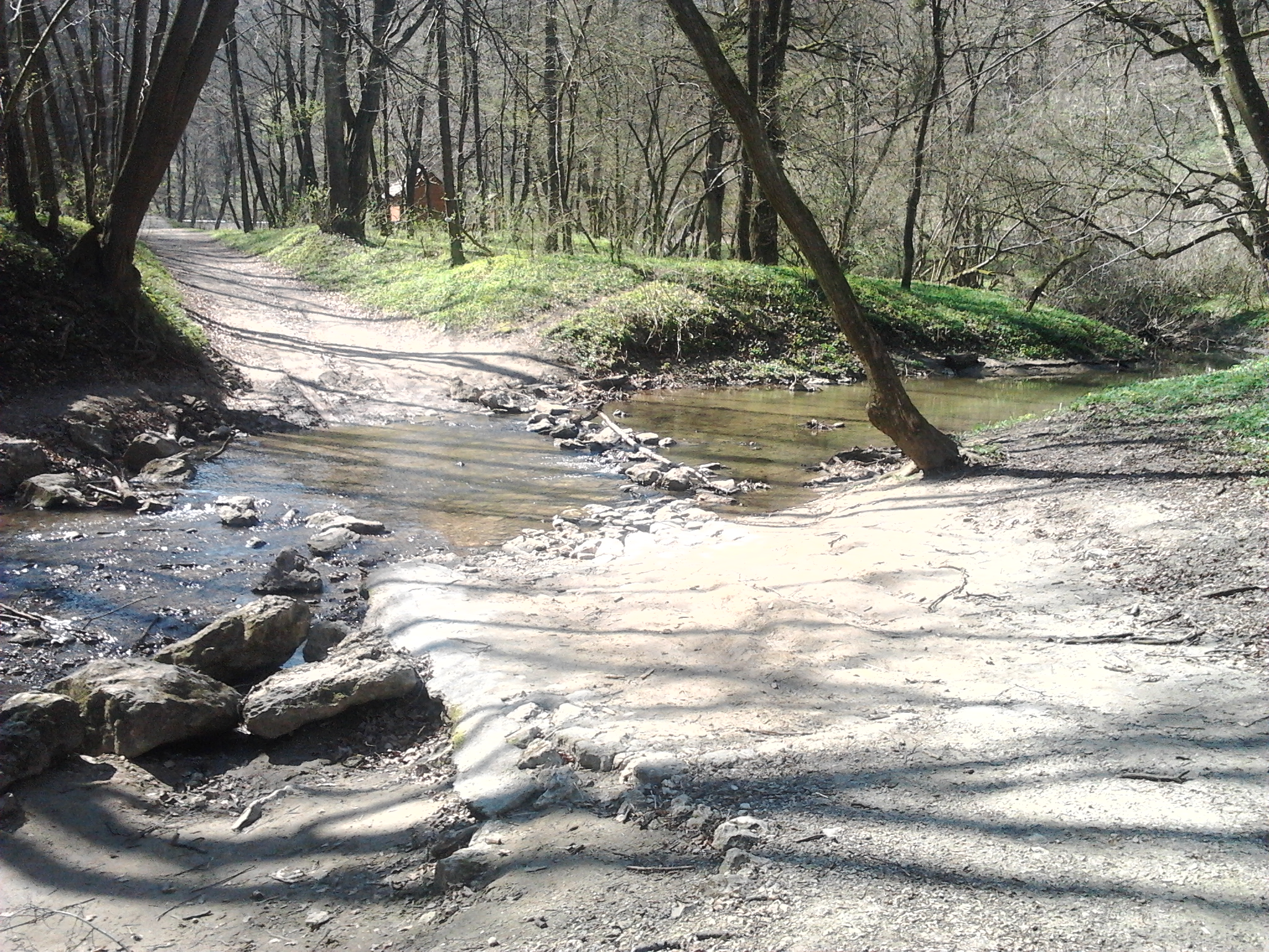 Gázló a Cuhán a piros turistaútvonalon. A patakot számos alkalommal kell így átszelni.